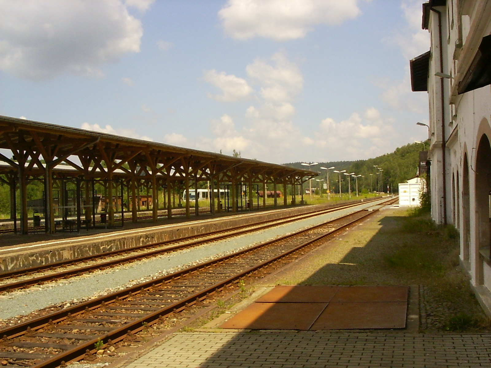 Bahnsteig in Adorf, Vogtland